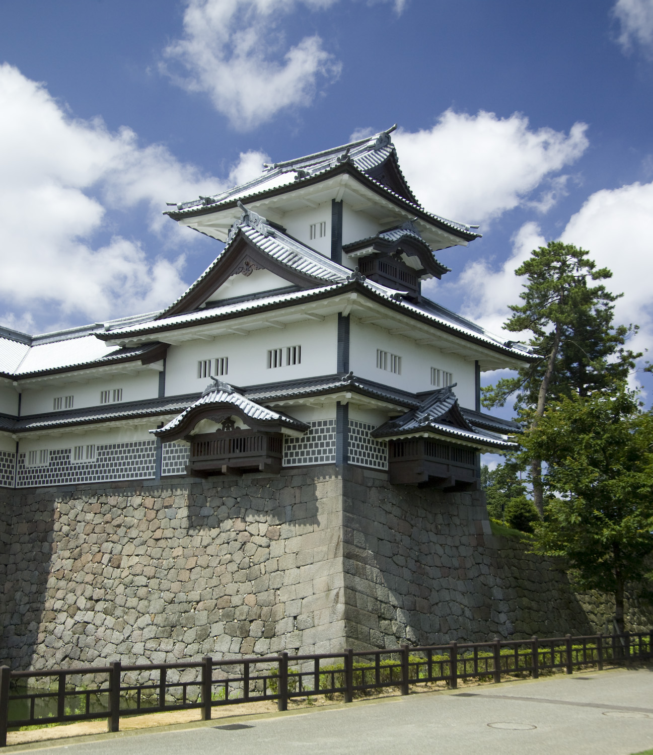 Kanazawa Castle, Kanazawa, Ishikawa Prefecture, Japan Hishi Yagura